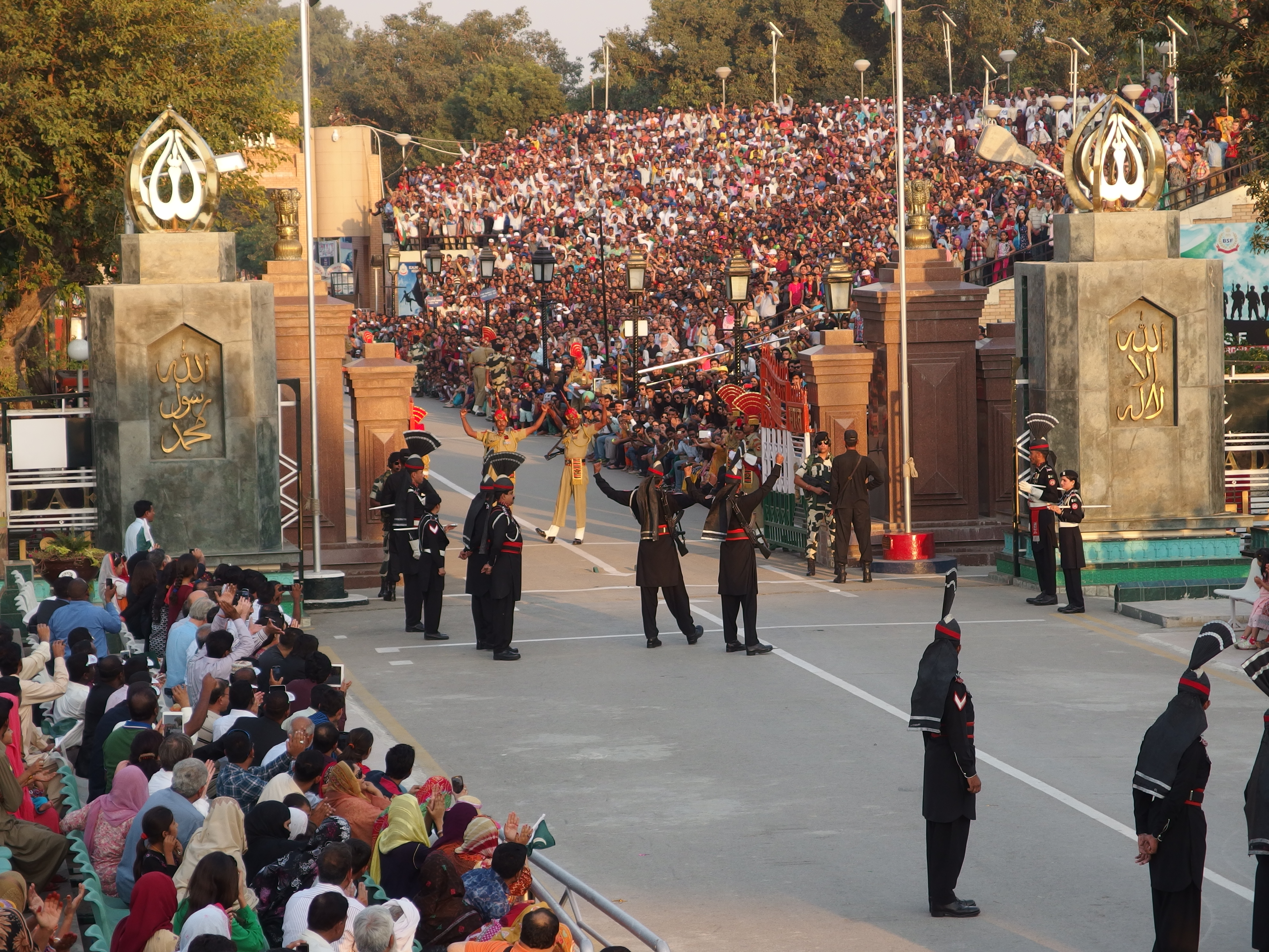 טקס סגירת הגבול בין הודו לפקיסטן